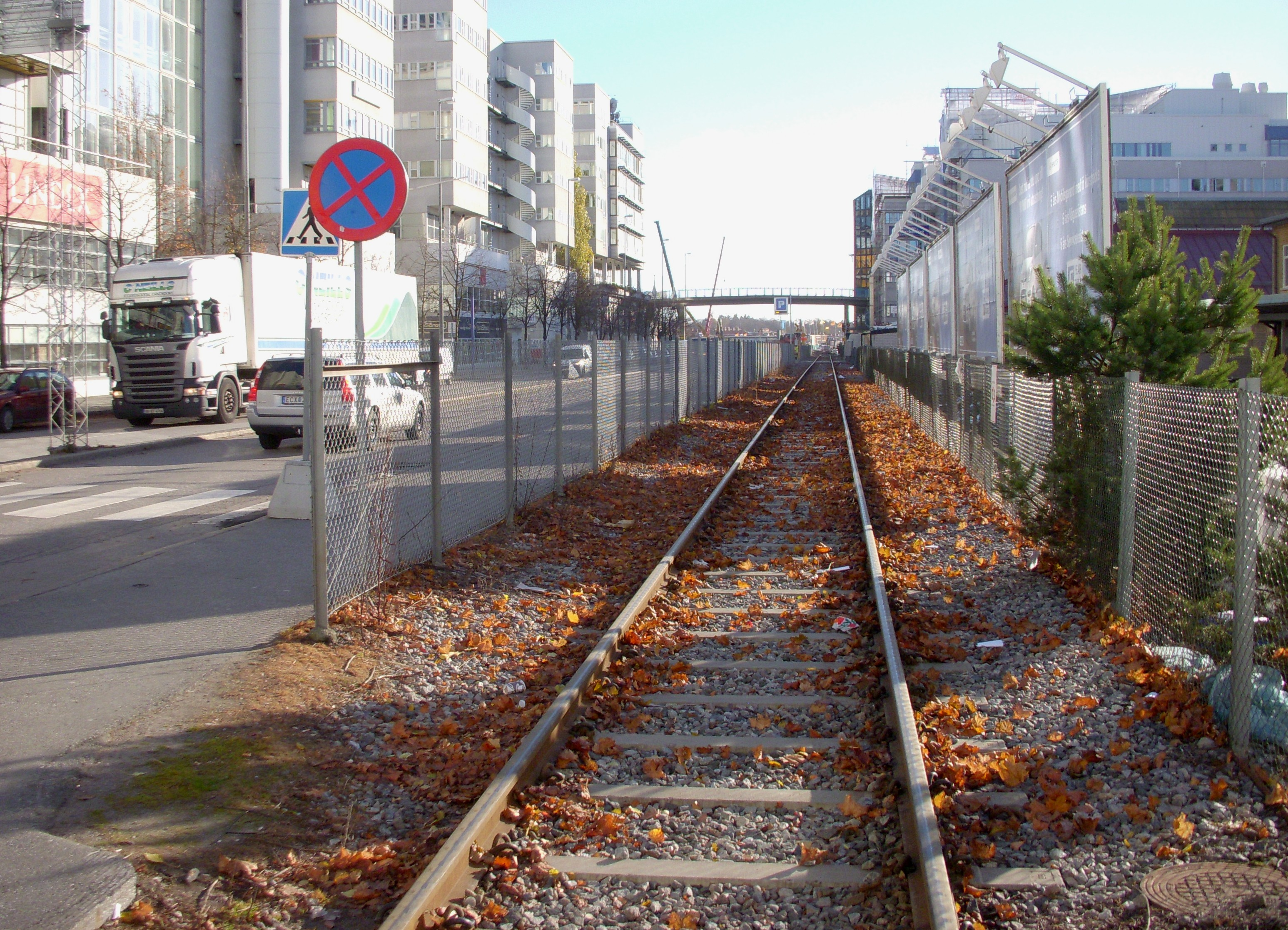 Slakthusområdet, Slakthusspåret